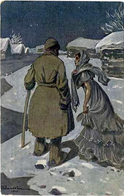 Гадание «Оклик прохожего». Дореволюционная открытка.